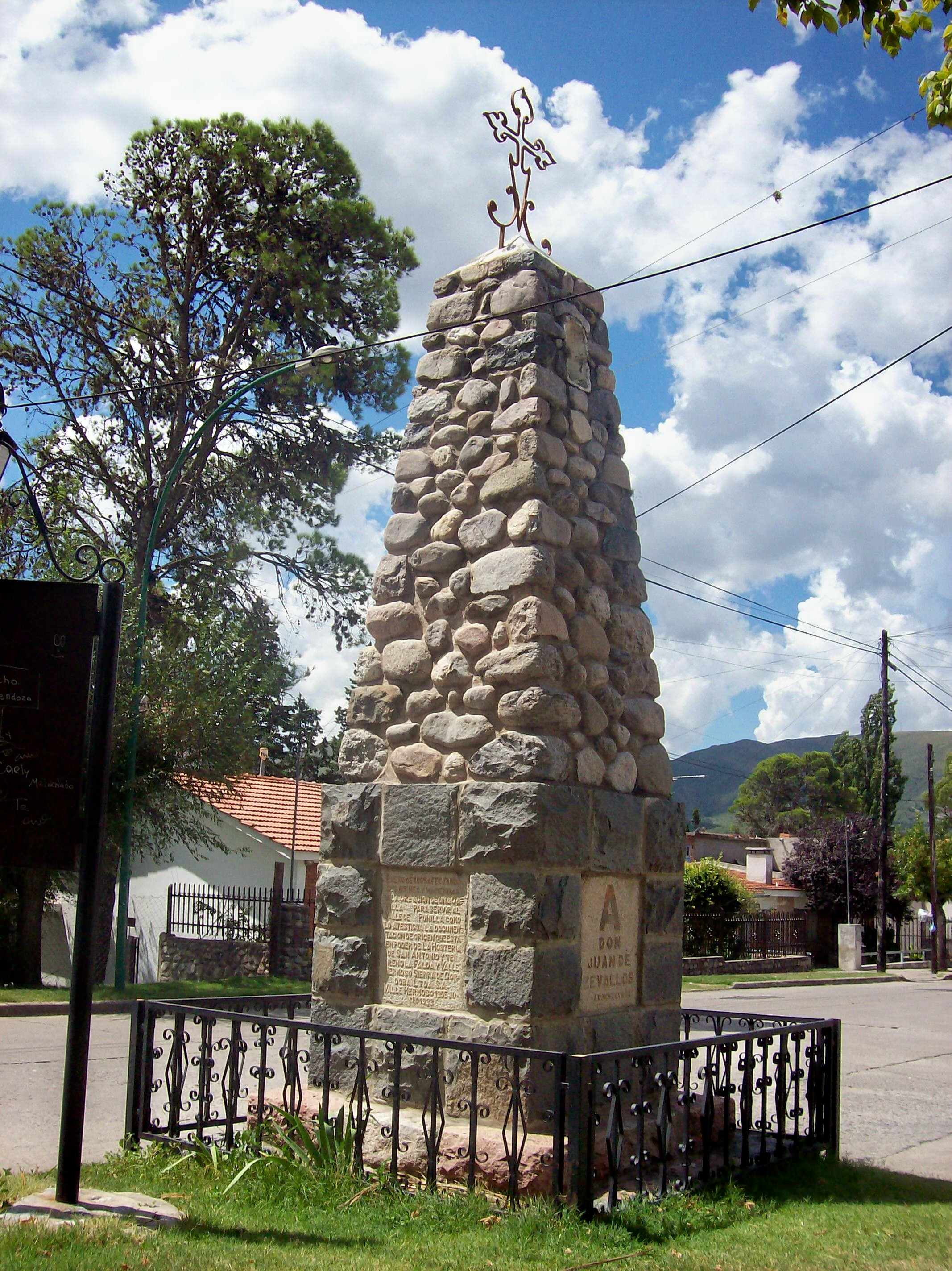 Crucero galaico en Calle Fleming, Barrio de San Antonio, en Valle Hermoso, provincia de Córdoba, Argentina. Foto tomada de O a E